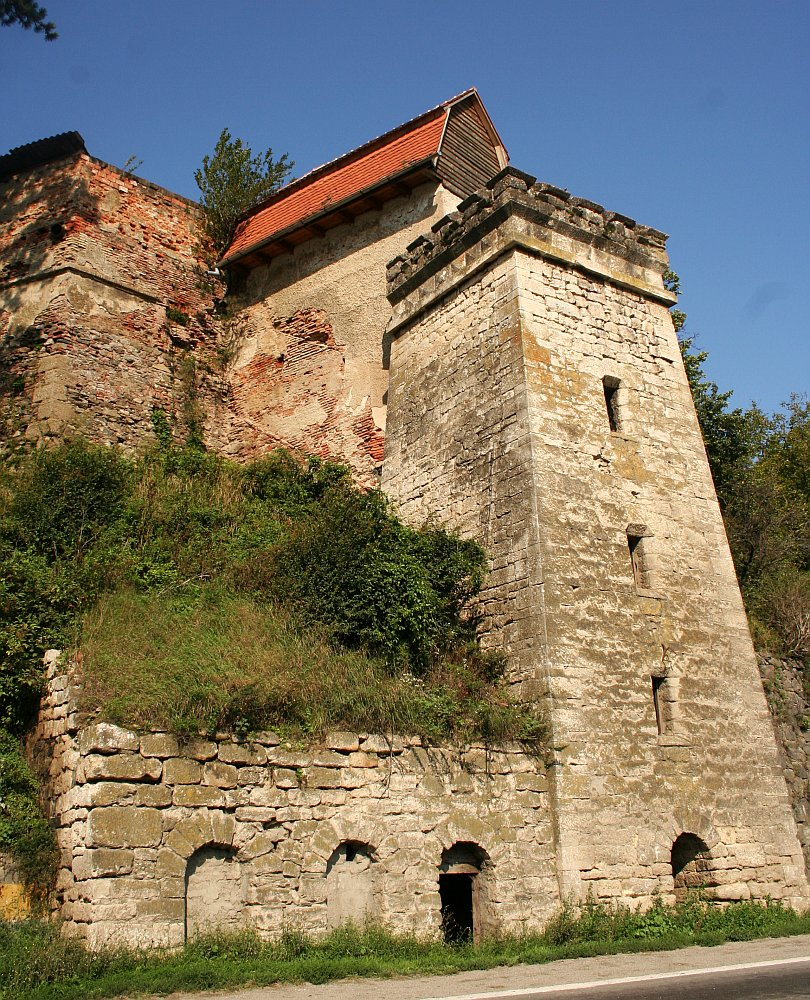 Tower in Boiţa, Sibiu, Romania